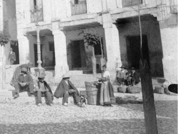 Plaza Nueva y al fondo Los Portalillos